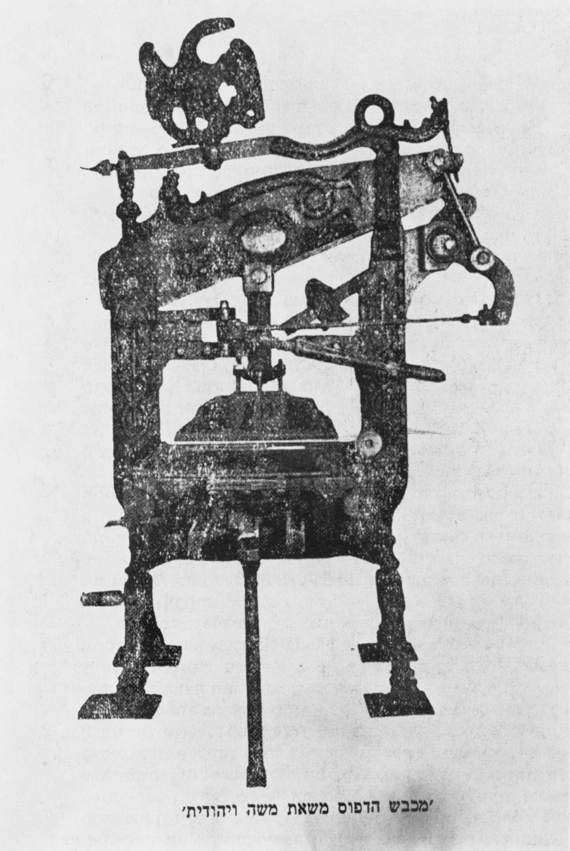 מכבש הדפוס "משאת משה ויהודית" של דפוס ב"ק